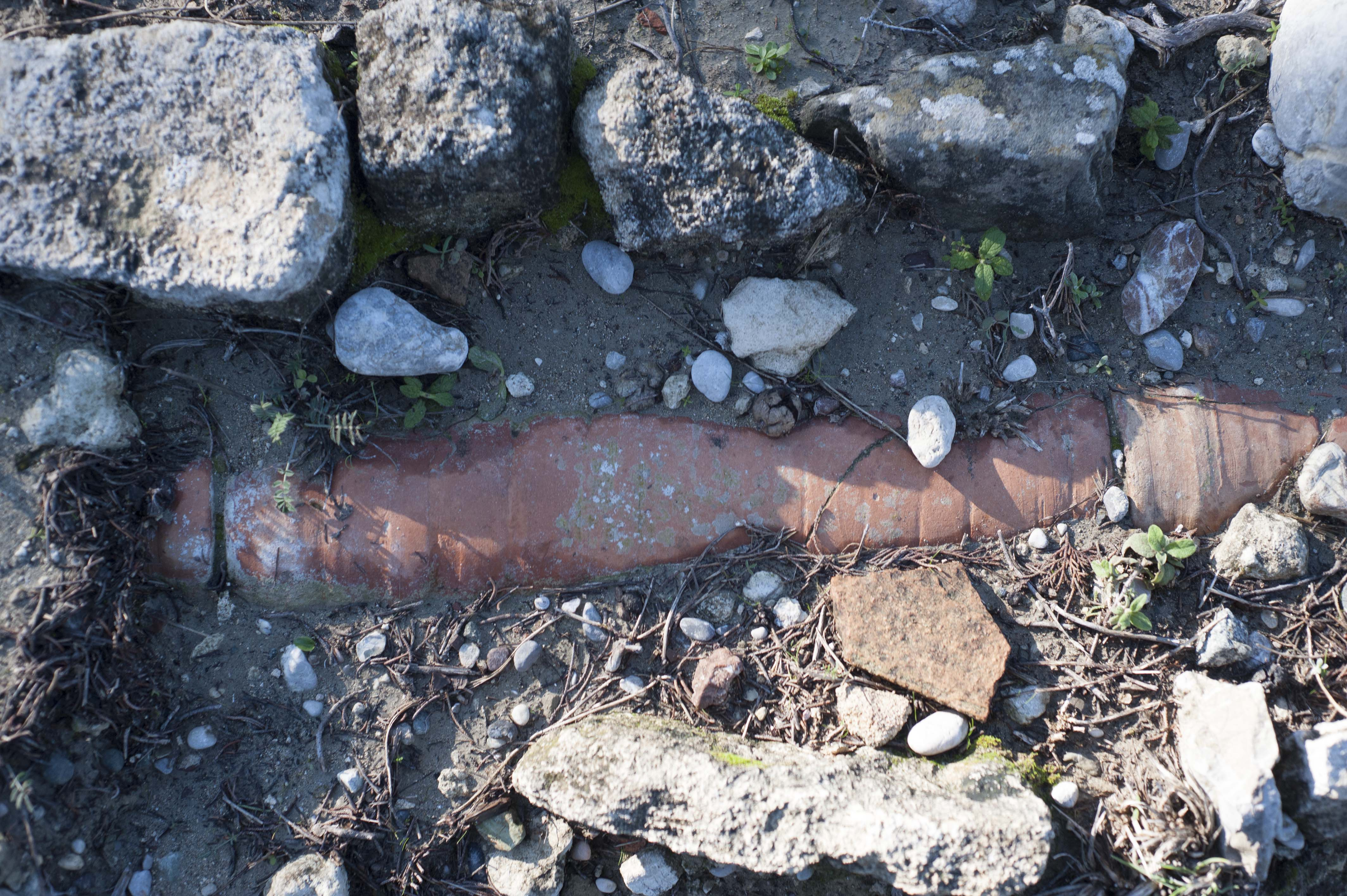 Κεραμικός αγωγός